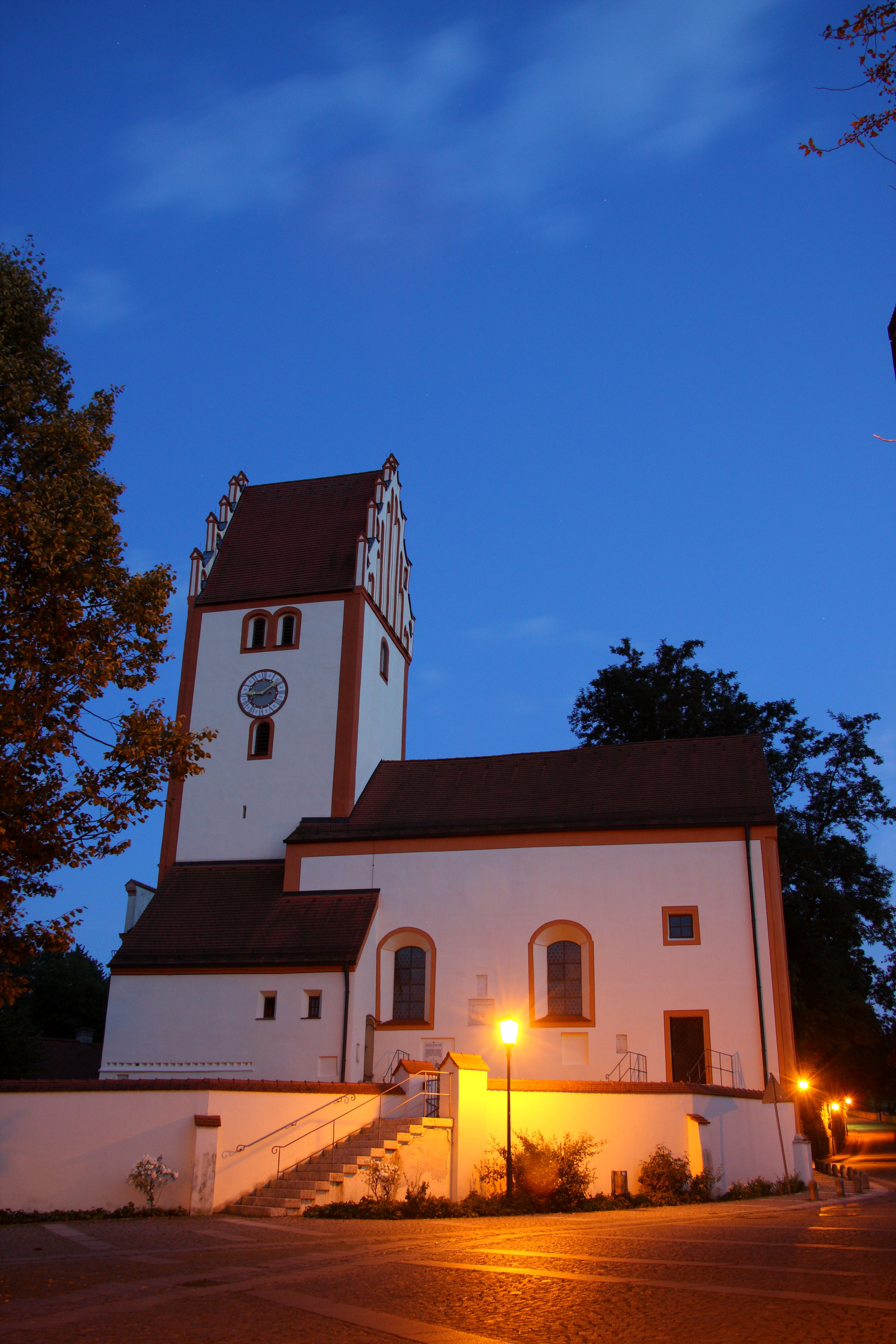 Alte kath. Pfarrkirche St. Johannes d. T. in Rohrbach an der Ilm (Oberbayern)This is a photograph of an architectural monument.